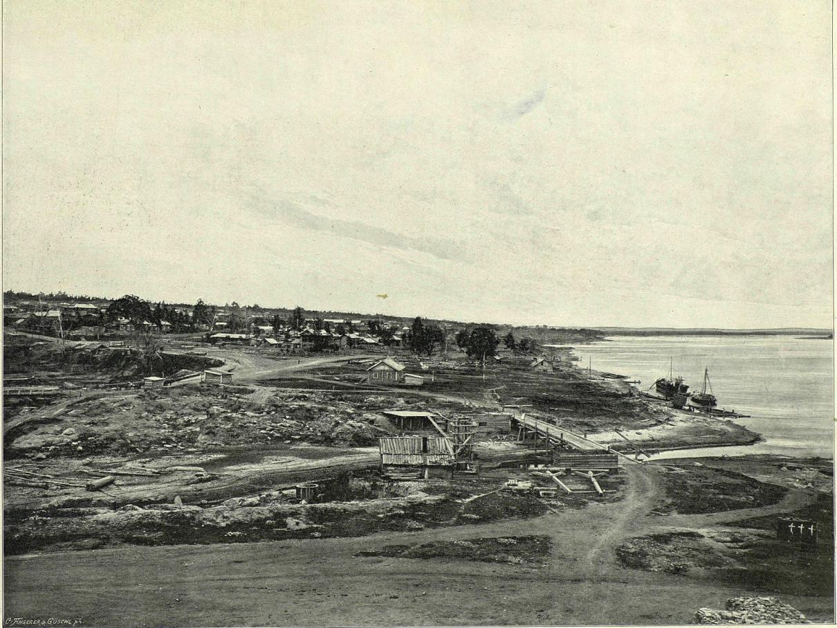 Ново-Николаевский посёлок расположен на правом берегу Оби и речке Каменке, впадающей в неё на земле, принадлежащей кабинету его императорского величества и входящей в состав Алтайского Горного округа. Вызванный к жизни проведённой железной дорогой посёлок разрастается с замечательной, чисто американской быстротой, приобретая с каждым годом всё большее значение благодаря выгодному своему местоположению. Посёлок раскинулся на протяжении восьми квадратных вёрст и представляет характерную картину кипучей, лихорадочной жизни первых пионеров в новом крае: вырастает изба поселенца, к ней прилепляется другая, третья и так образуются целые улицы домов, нередко кривых, с невыкорчеванными пнями, но всегда полных куда-то стремящихся деловых людей. Посёлок делится на шесть улиц и сорок кварталов.